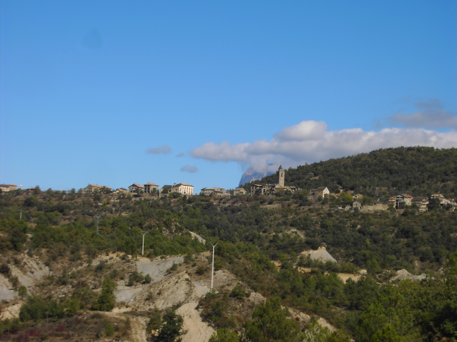 Cosculluela de Sobrarbe.